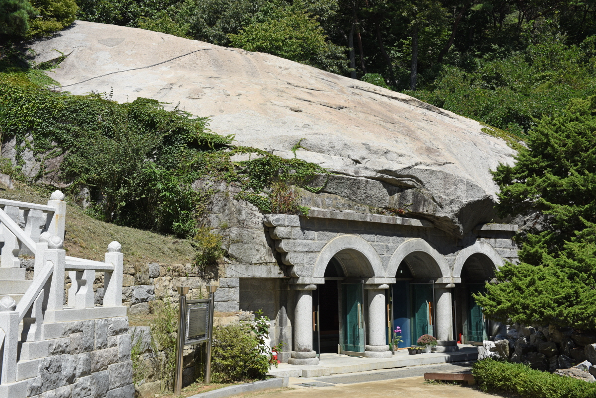 강화 보문사 석실 (인천광역시 유형문화재 제27호)